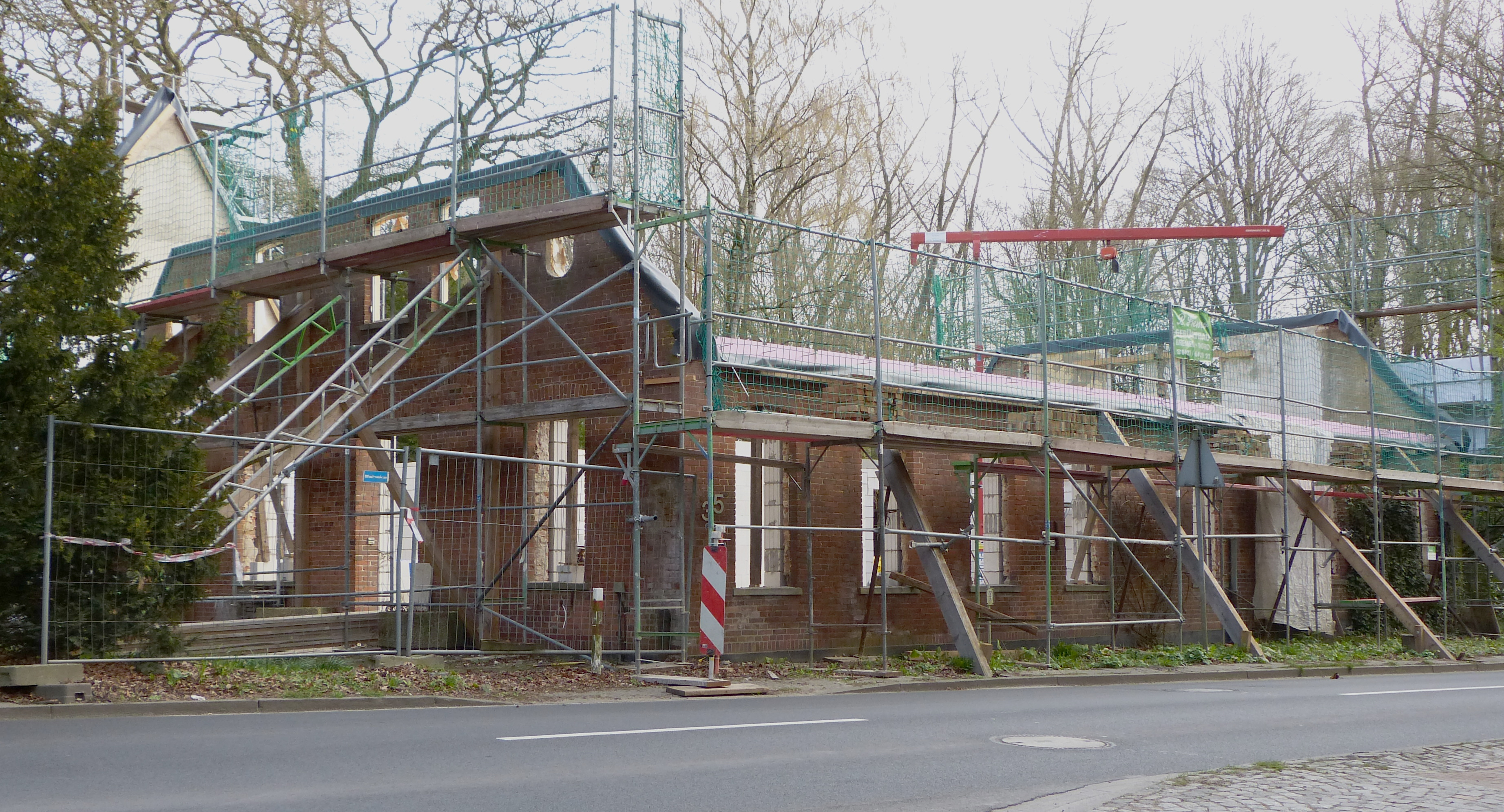 Haus Tillery in Bremen, Auf dem Hohen Ufer 35 (während der Restaurierung April 2012)Das abgebildete Objekt ist ein geschütztes Kulturdenkmal in der Freien Hansestadt Bremen, mit der Nr. 1884 beim Landesamt für Denkmalpflege registriert.